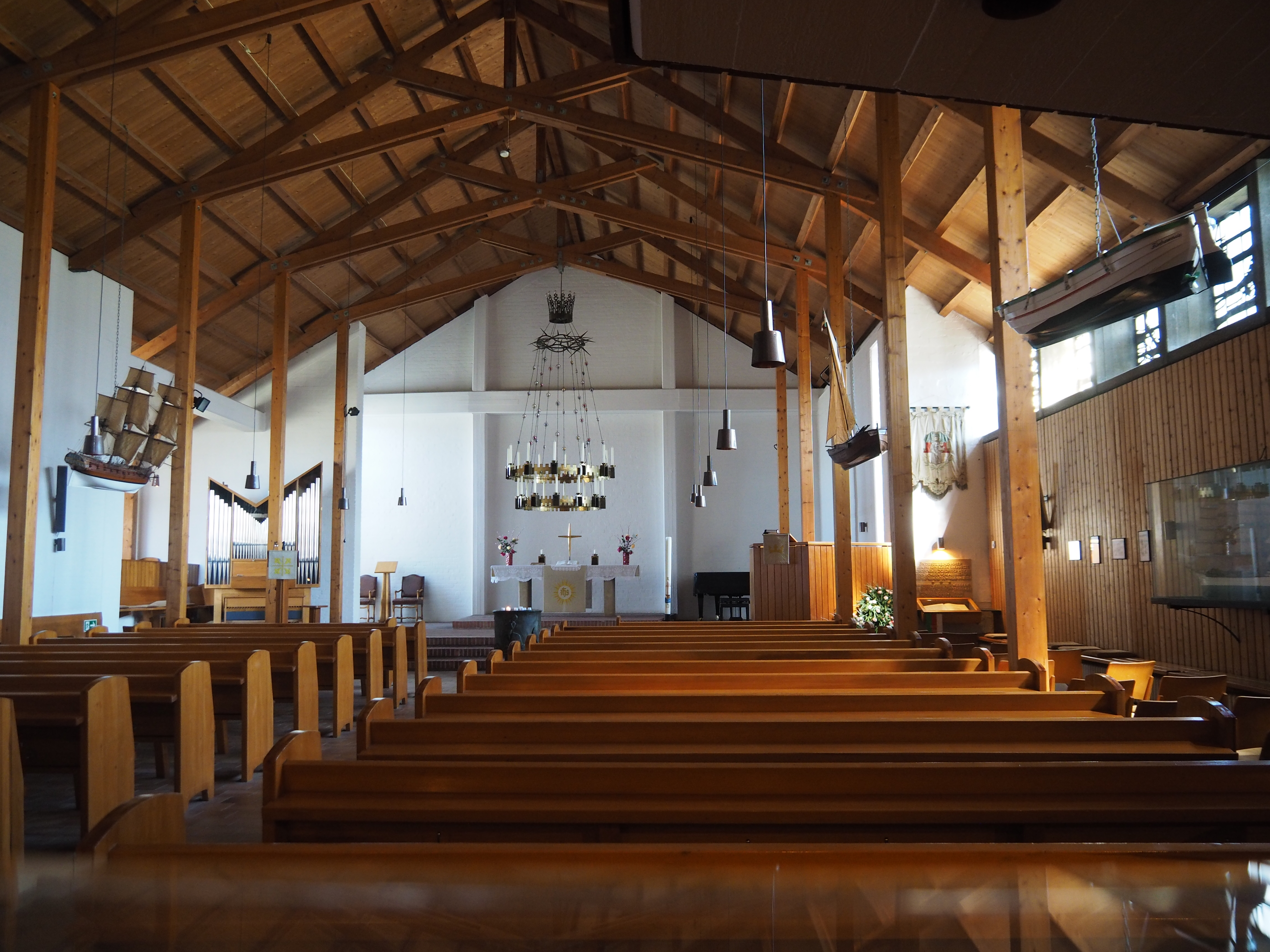 Innenraum der Kirche St. Nicolai auf Helgoland mit Altar und Chororgel